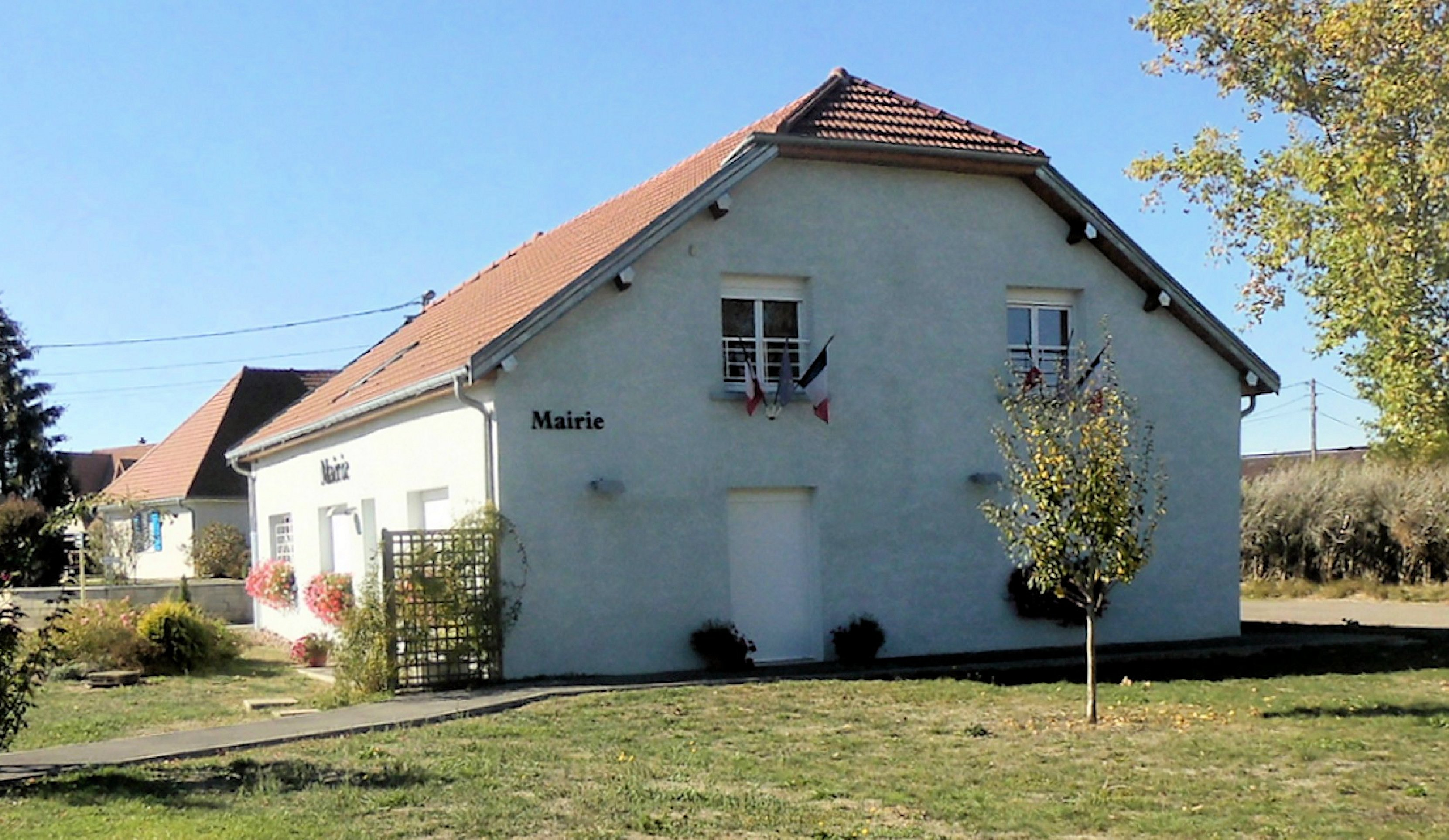 La maitie de Cubry-lès-Faverney